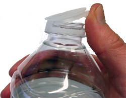 Nouveau concept de bouchon écologique